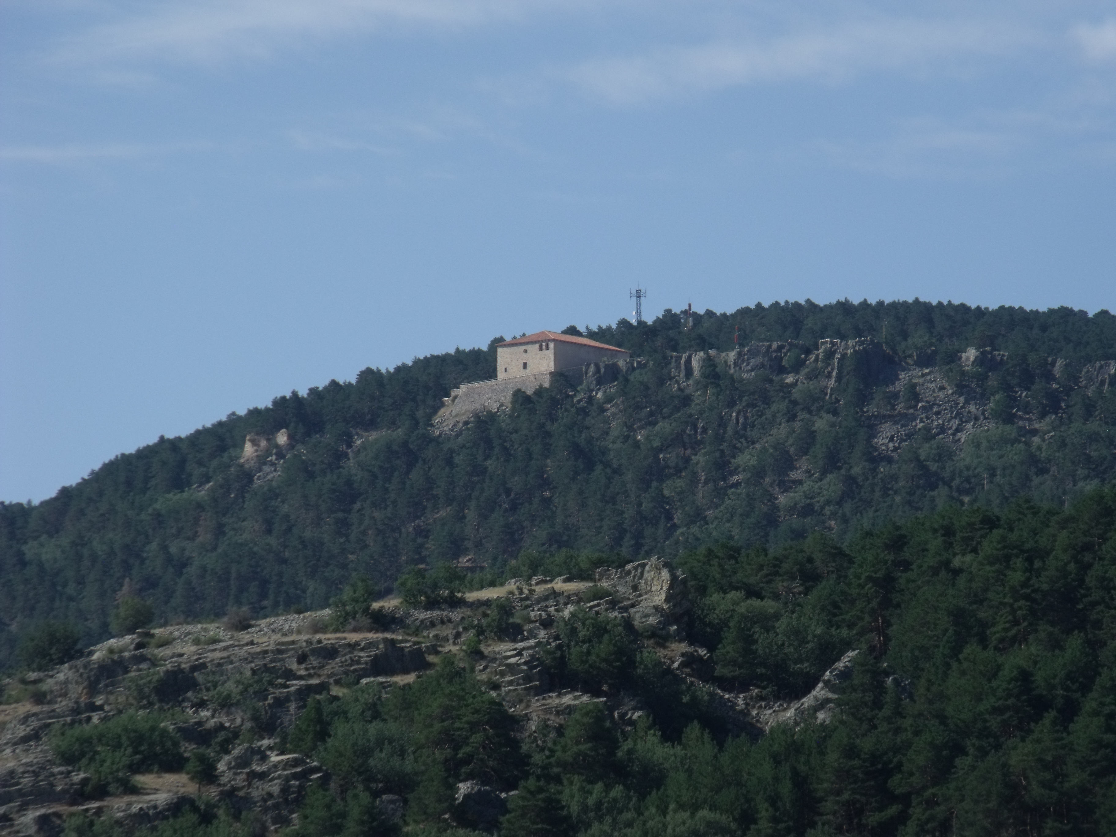 Orihuela del Tremedal.